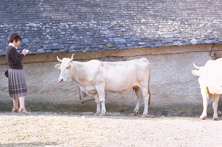 Photographie de vache lourdaise en cours de recensement dans un village de montagne des Hautes Pyrénées